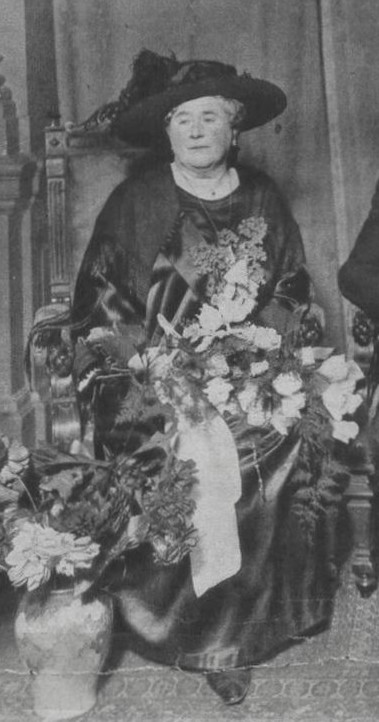 Mevrouw Marie van Eysden-Vink en de heer P. D. van Eysden, afgetreden directeur van het Rotterdamsch Tooneelgezelschap, na de schitterende en hartelijke huldiging van den heer van Eysden.